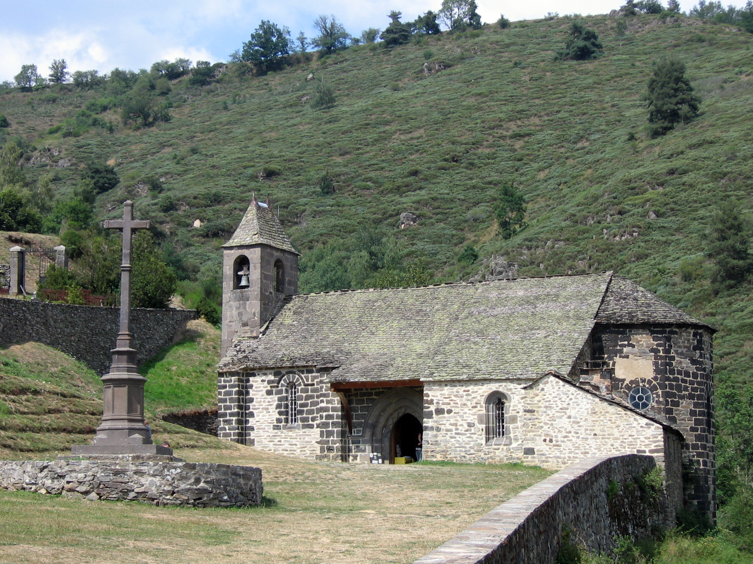 Chateau d'Alleuze (Cantal) ; photographie personnelle mise dans le domaine public.